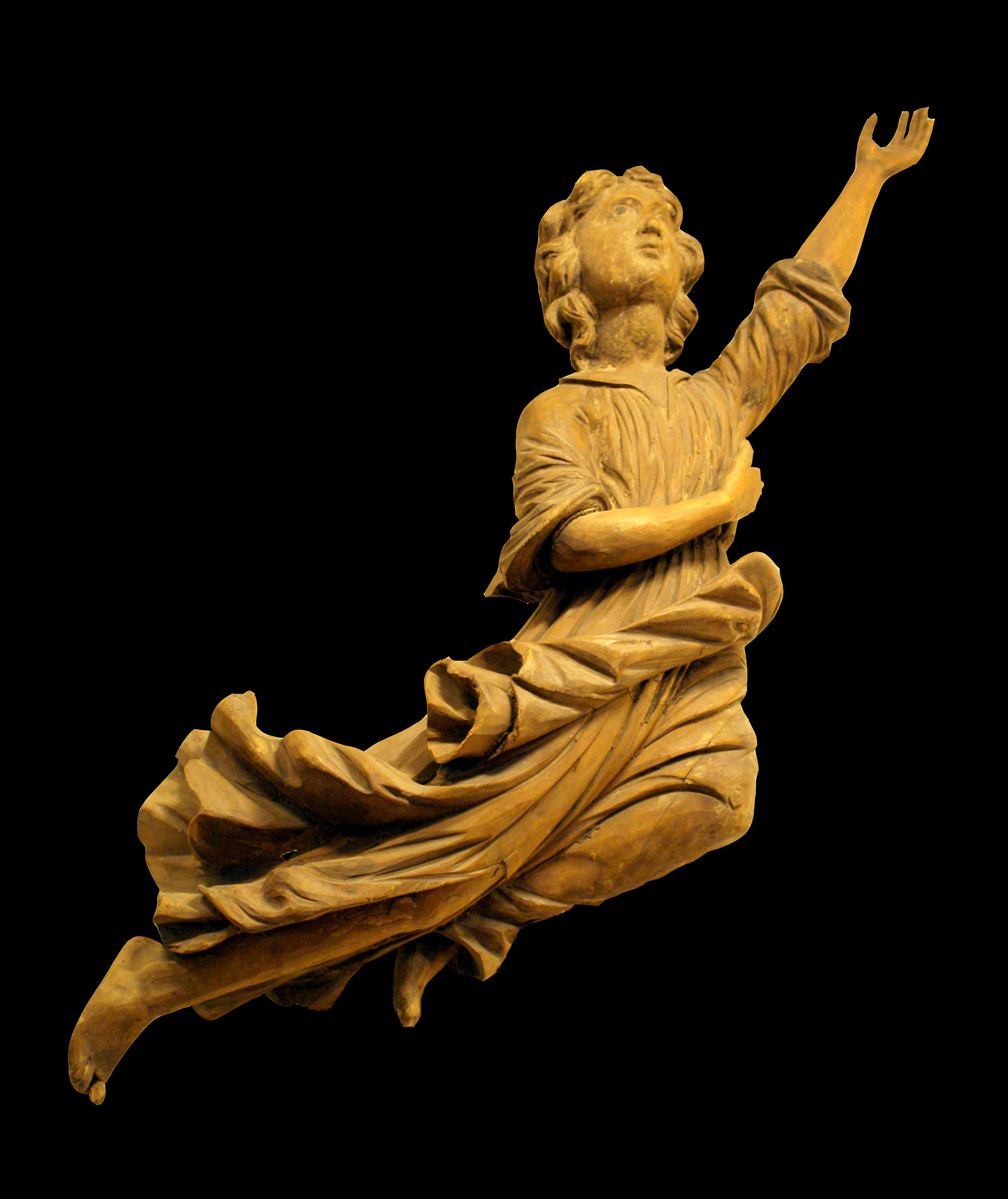 Анёлы. XVIII ст. Гарадзец Быхаўскага раёна Магілёўскай вобласці